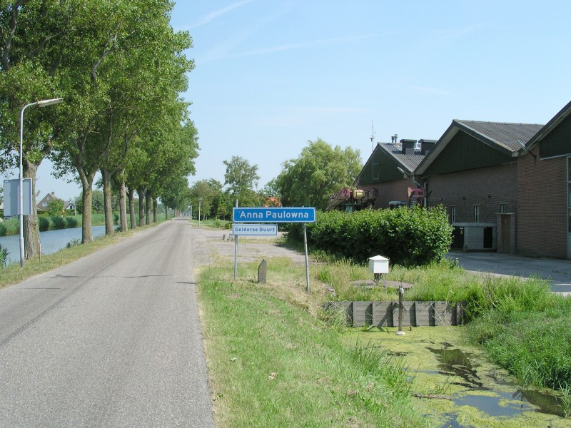 De Gelderse buurt in Anna Paulowna. The Hamlet Gelderse Buurt in Anna Paulowna.